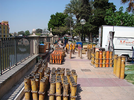 Instalacion del armazón para el disparo del espectáculo de fuegos artificiales para las fiestas del Entierro de la Sardina en la ciudad de Murcia, (Spain).